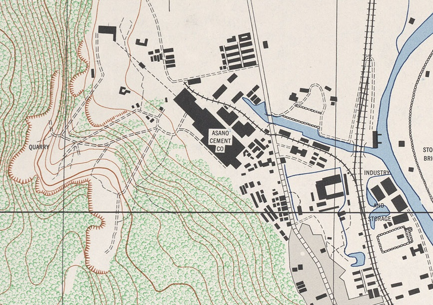 淺野水泥株式會社高雄工場平面圖